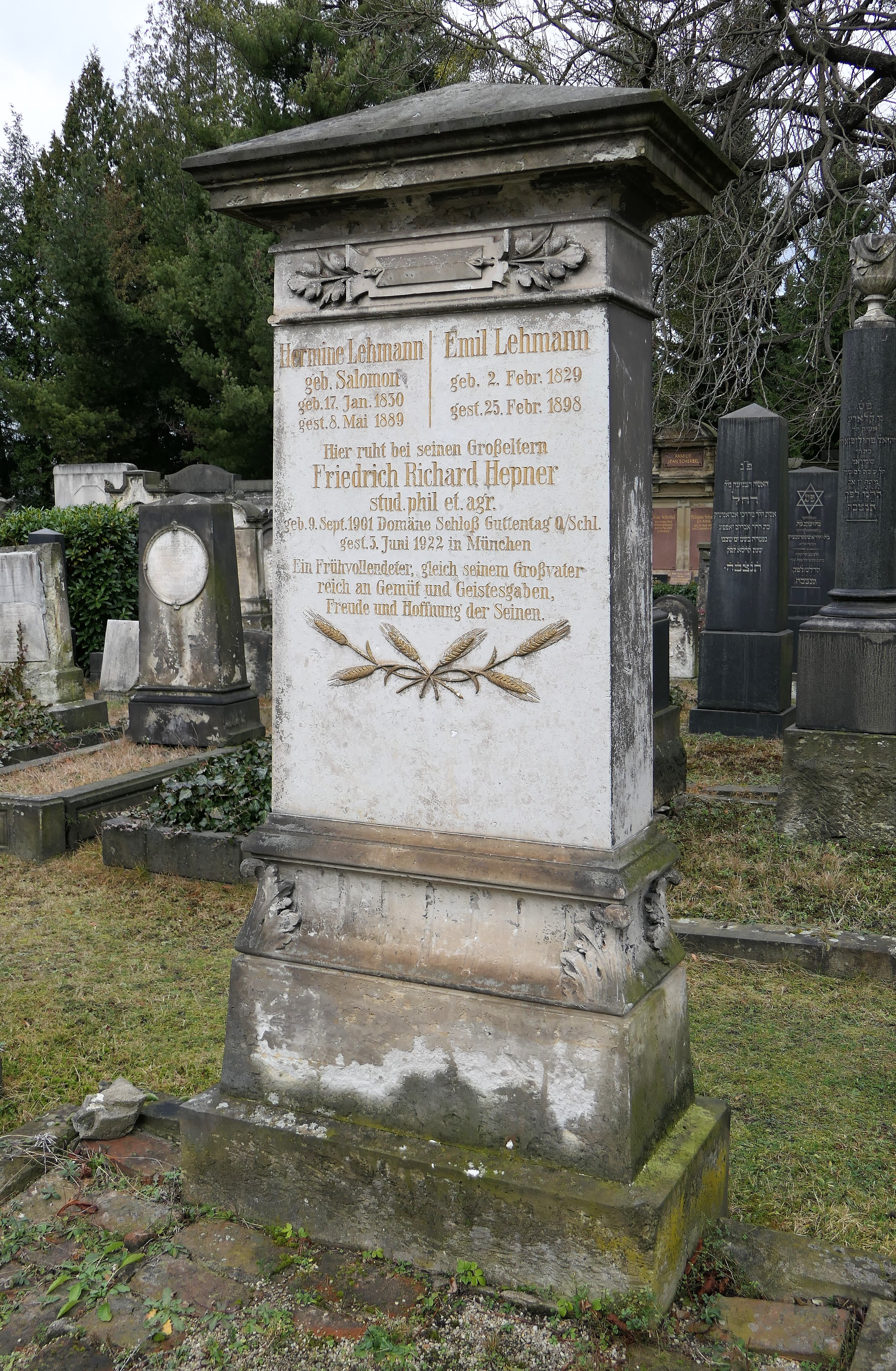 Grab von Emil Lehmann, Neuer Jüdischer Friedhof Dresden